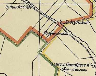 Сёла Довсунское, Сотниковское и заштатный город Святого Креста (Карабаглы) на карте Ставропольской губернии 1909 года